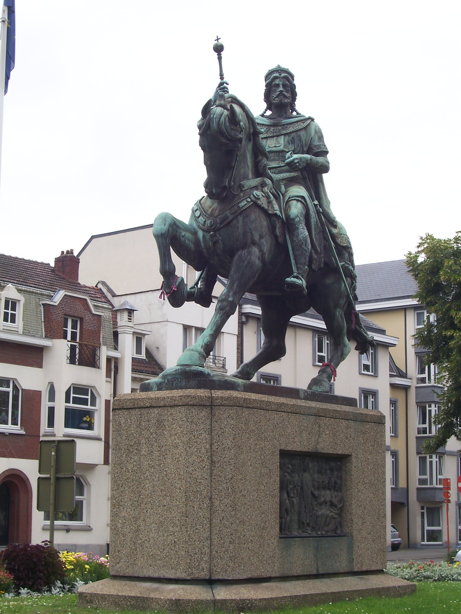 Statue équestre due à l'architecte Vincent et au sculpteur Jacquet, a été édifiée en 1868, en l'honneur du comte Baudouin VI (Baudouin IX, en Flandre). Elle ornait auparavant le rond-point de la place de Flandre à Mons dont le nom rappele l'union des comtés de Hainaut et de Flandre sous les mêmes princes du XIe au XIIIe siècle. Actuellement est se situe naturellement Avenue Baudouin de Constantinople.